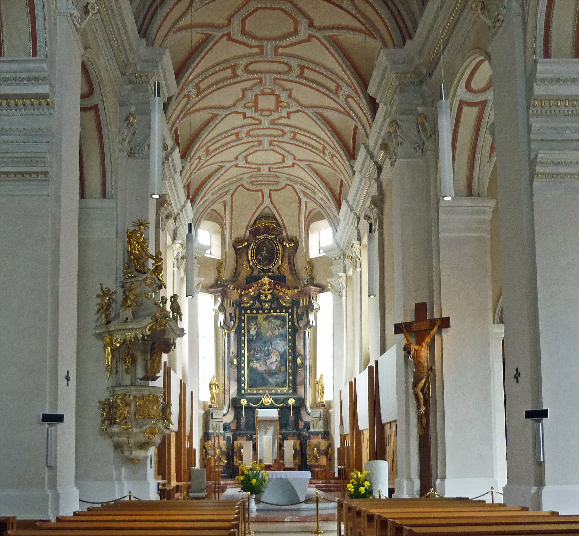 Kathedrale St. Nikolaus in Budweis (České Budějovice)